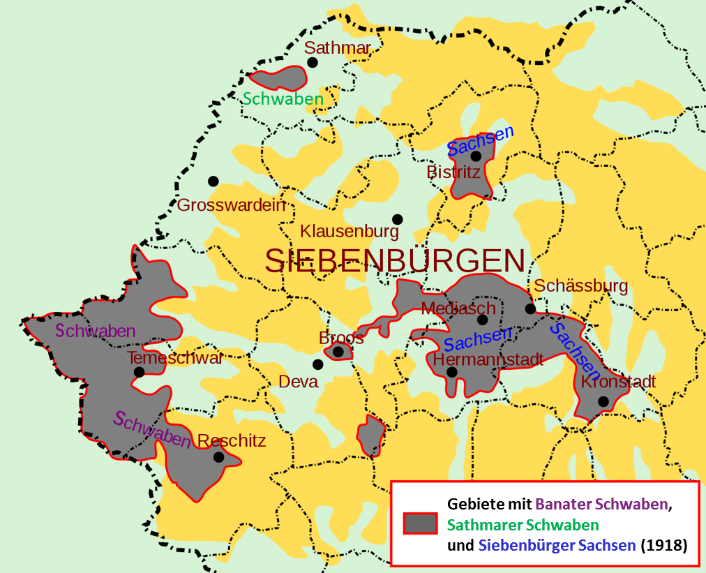 Gebiete in Rumänien mit Banater Schwaben, Sathmarer Schwaben und Siebenbürger Sachsen um 1918